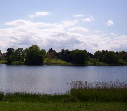 Naturschutzgebiet Küstenlandschaft zwischen Priwall und Barendorf mit Harkenbäkniederung. Delpsee - Blick vom Nordufer.